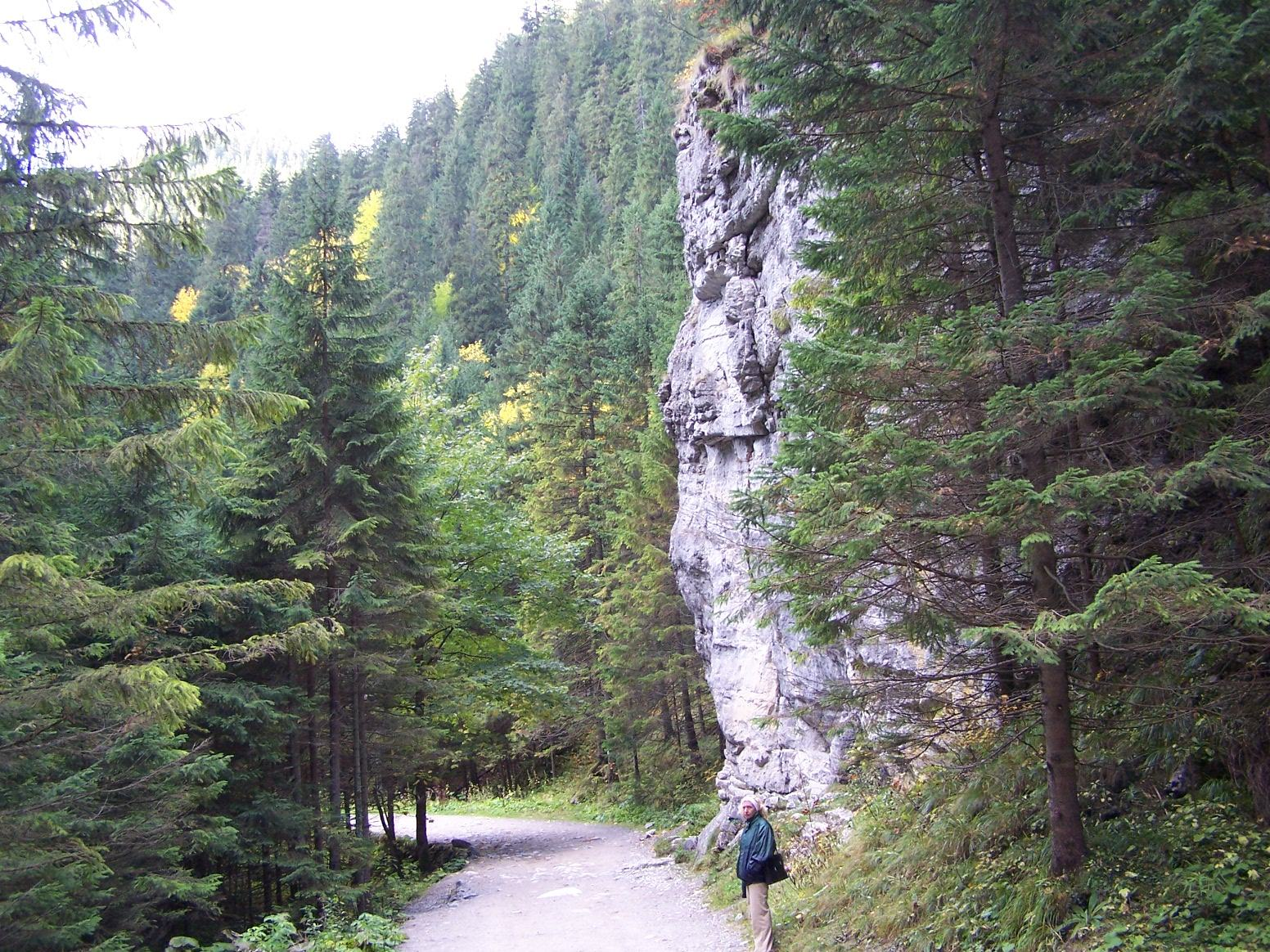 Dolina Kościeliska